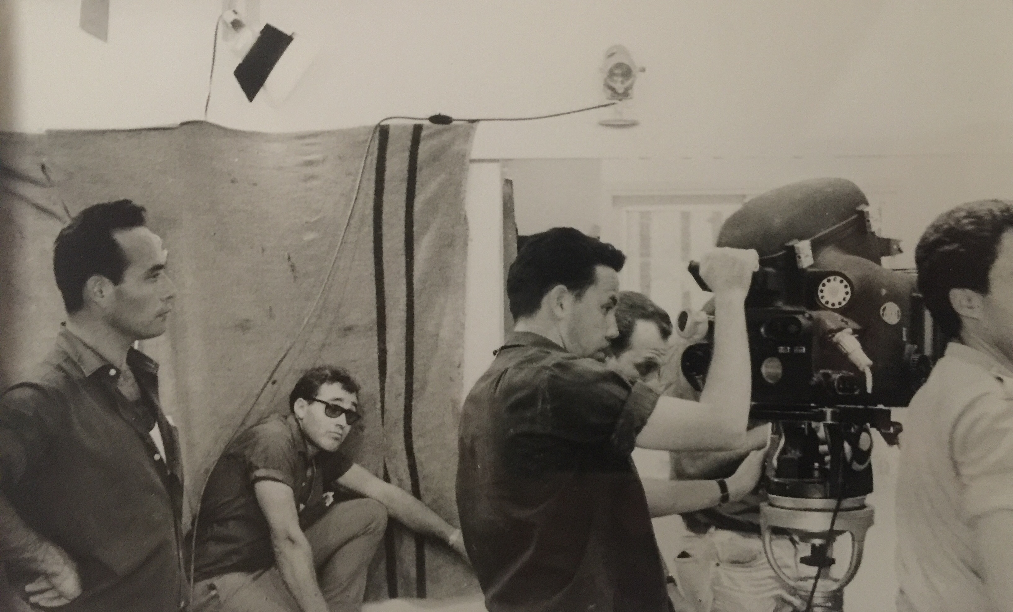 צולם בישראל ב-ינואר 1965. בתמונה מופיע אמציה חיוני